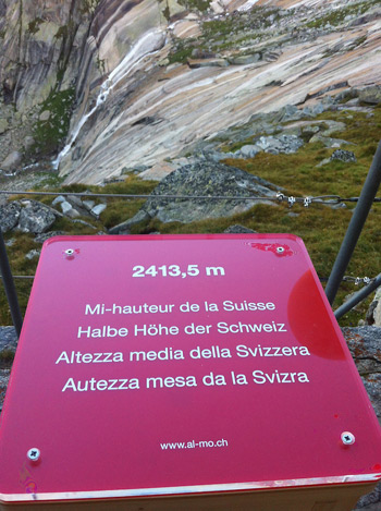 Le tabouret devant la cabane